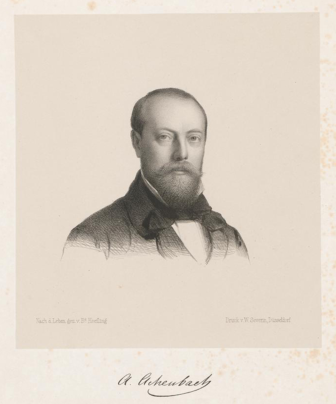 Bildnisse Düsseldorfer Künstler: nach dem Leben gezeichnet und lithographirt von Bernhard Höfling - Andreas Achenbach, 1853